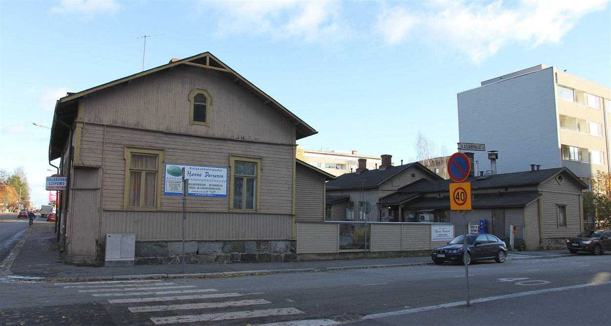 Hanna Partanen (1891–1969) oli Suomen kuuluisin kalakukkoleipuri. Kukkoja tehdään edelleen perinteisen tavan mukaan käsityönä ja suomalaisista raaka-aineista (tärkein suomalainen ruis) Kuopion keskustassa Kasarmikadulla sijaitsevassa leipomossa. Hanna Partasen nimeä kantava leipomo työllistää vuodenajoista riippuen 10–20 työntekijää.